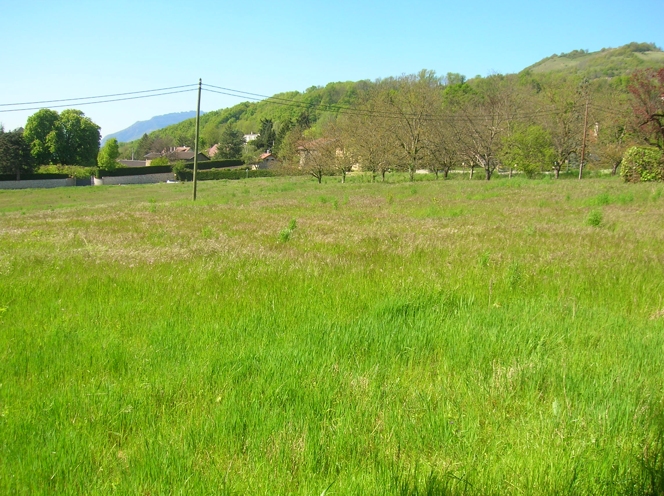 champs des Suisses, près de la chapelle. Angonnes, Brié-et-Angonnes, Isère, France.